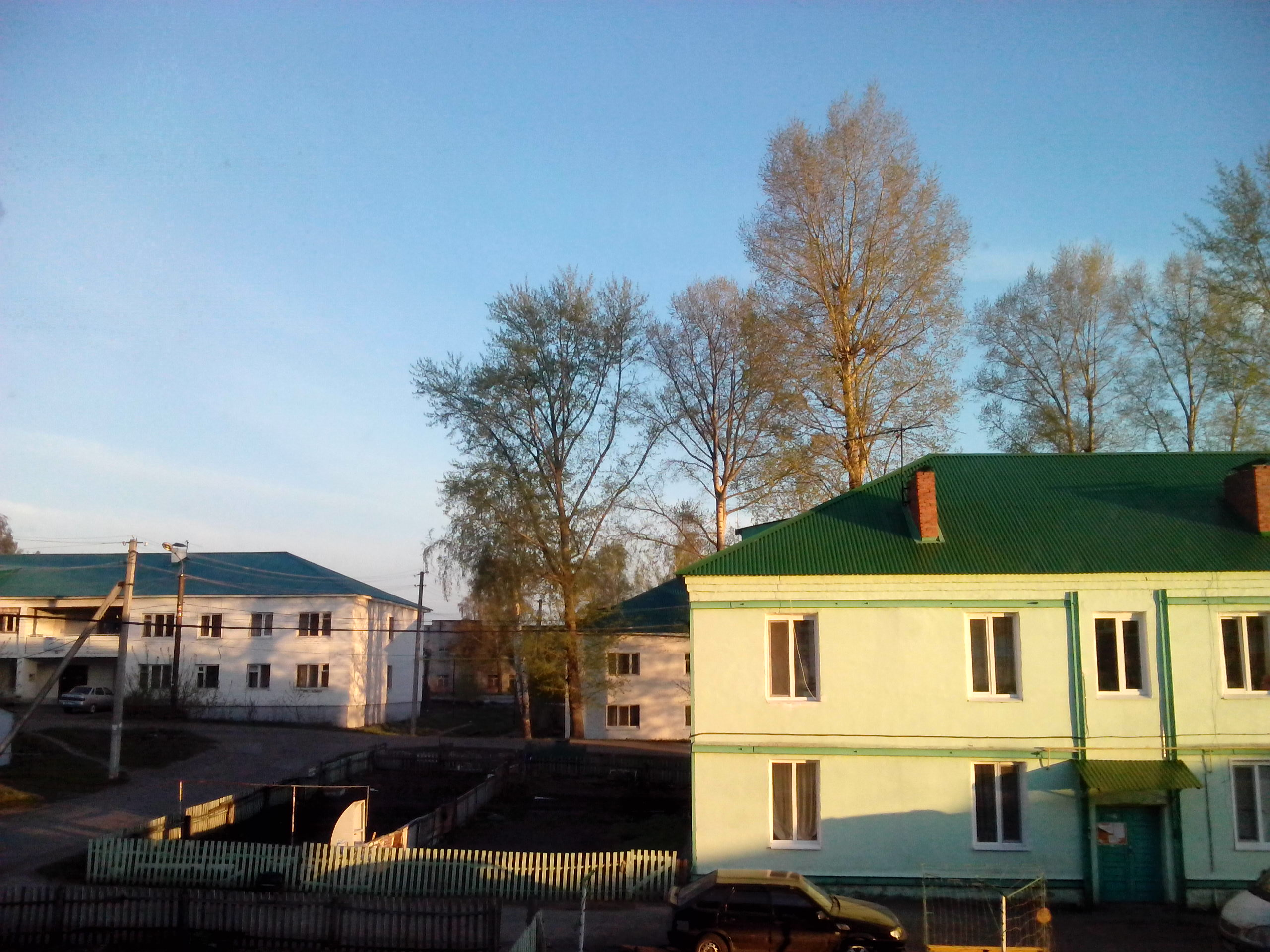 Жилые дома N 7 и 8 на улице Гагарина. Ишеевка.